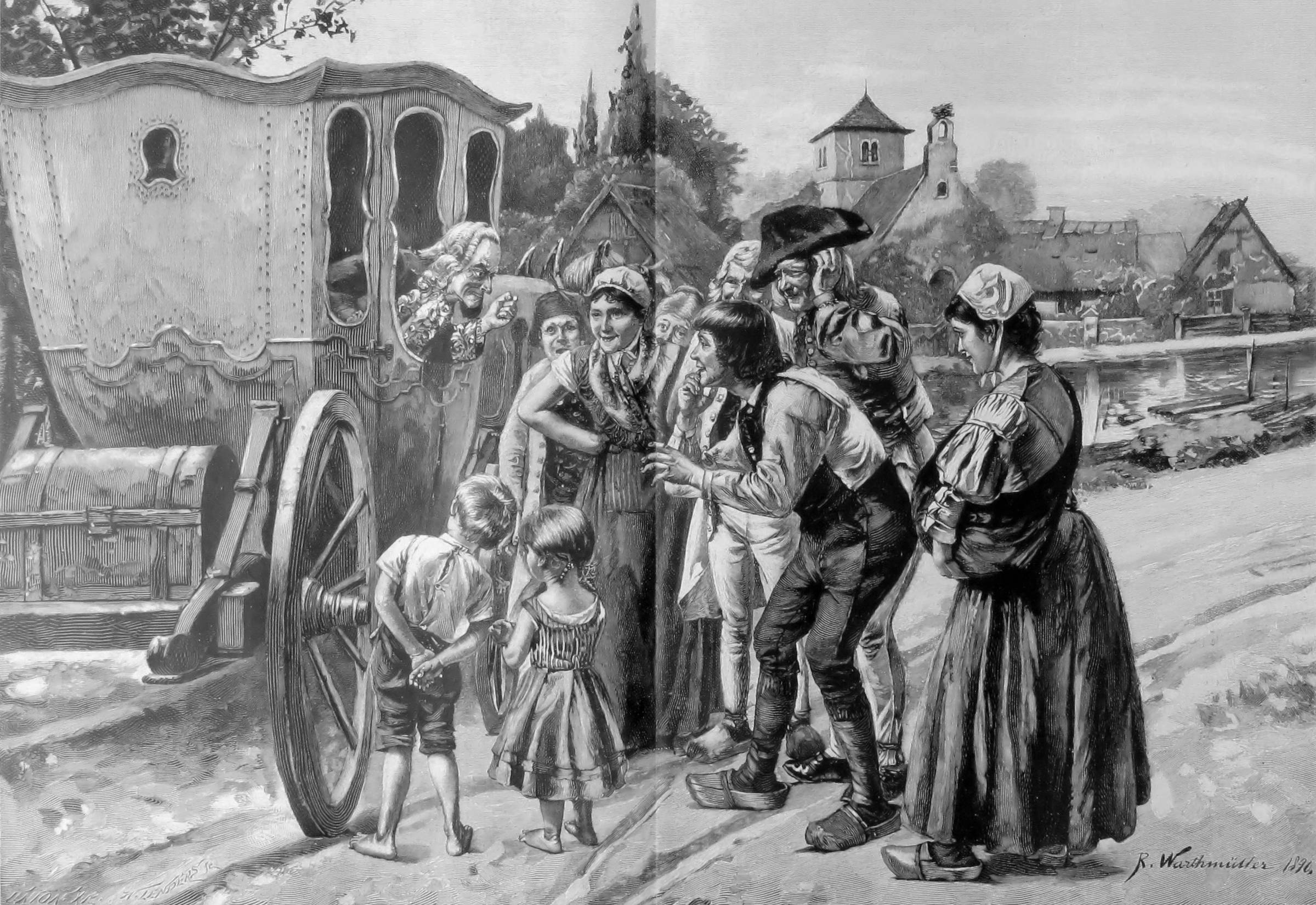 Voltaire in Pommern - für „Die Gartenlaube“ gezeichnet von Robert Warthmüller.